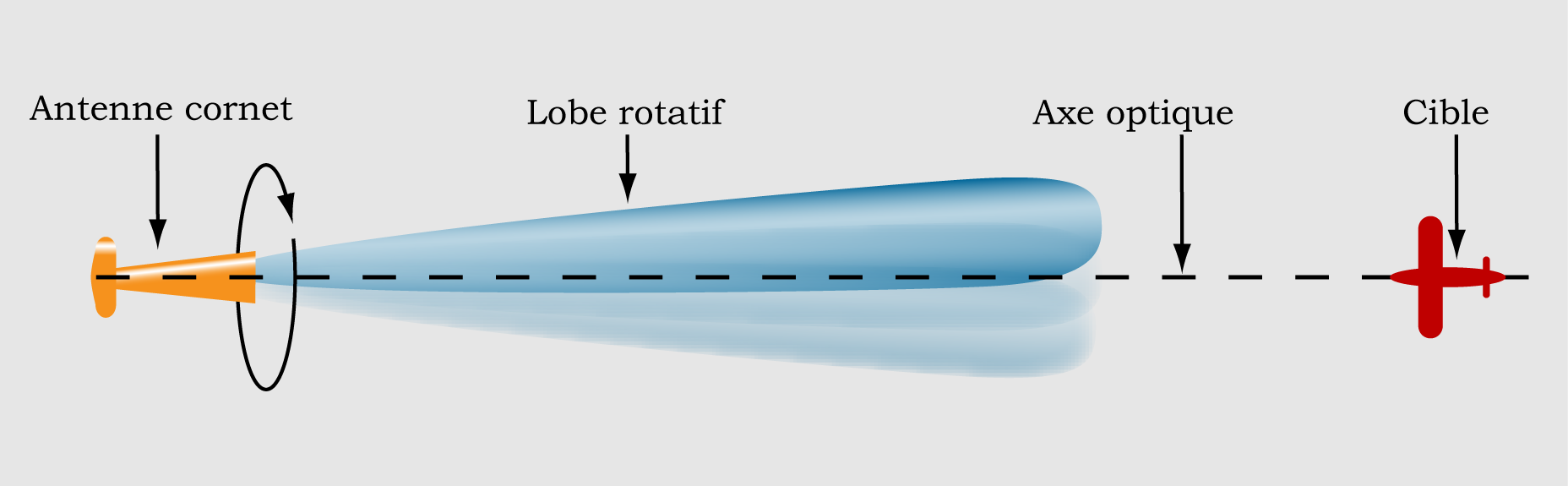 Schéma du lobe rotatif d'un radar à balayage conique.